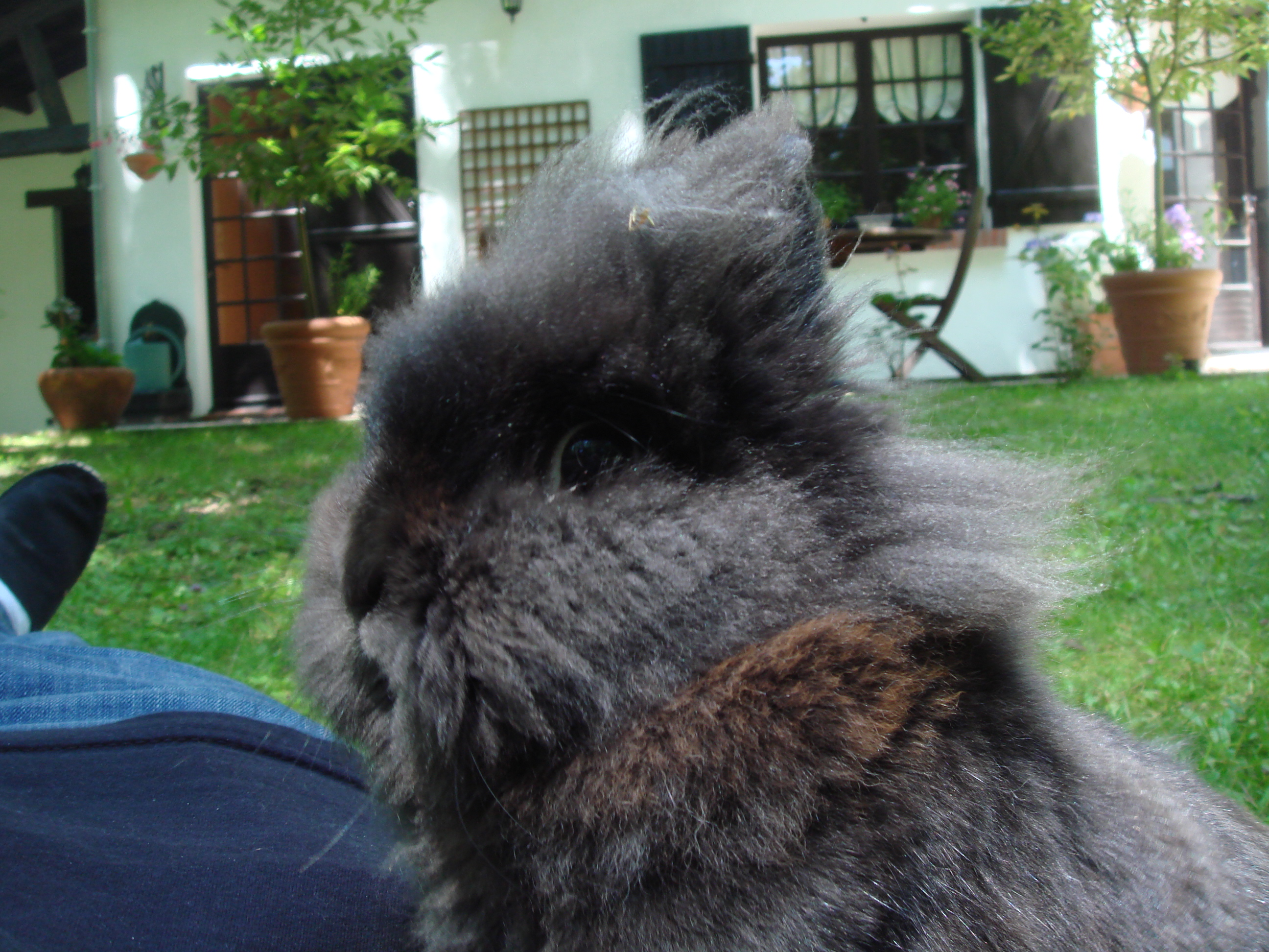 Gros plan sur la tête d'un lapin nain tête de lion (selon les vendeurs du magasin où nous l'avons acheté).